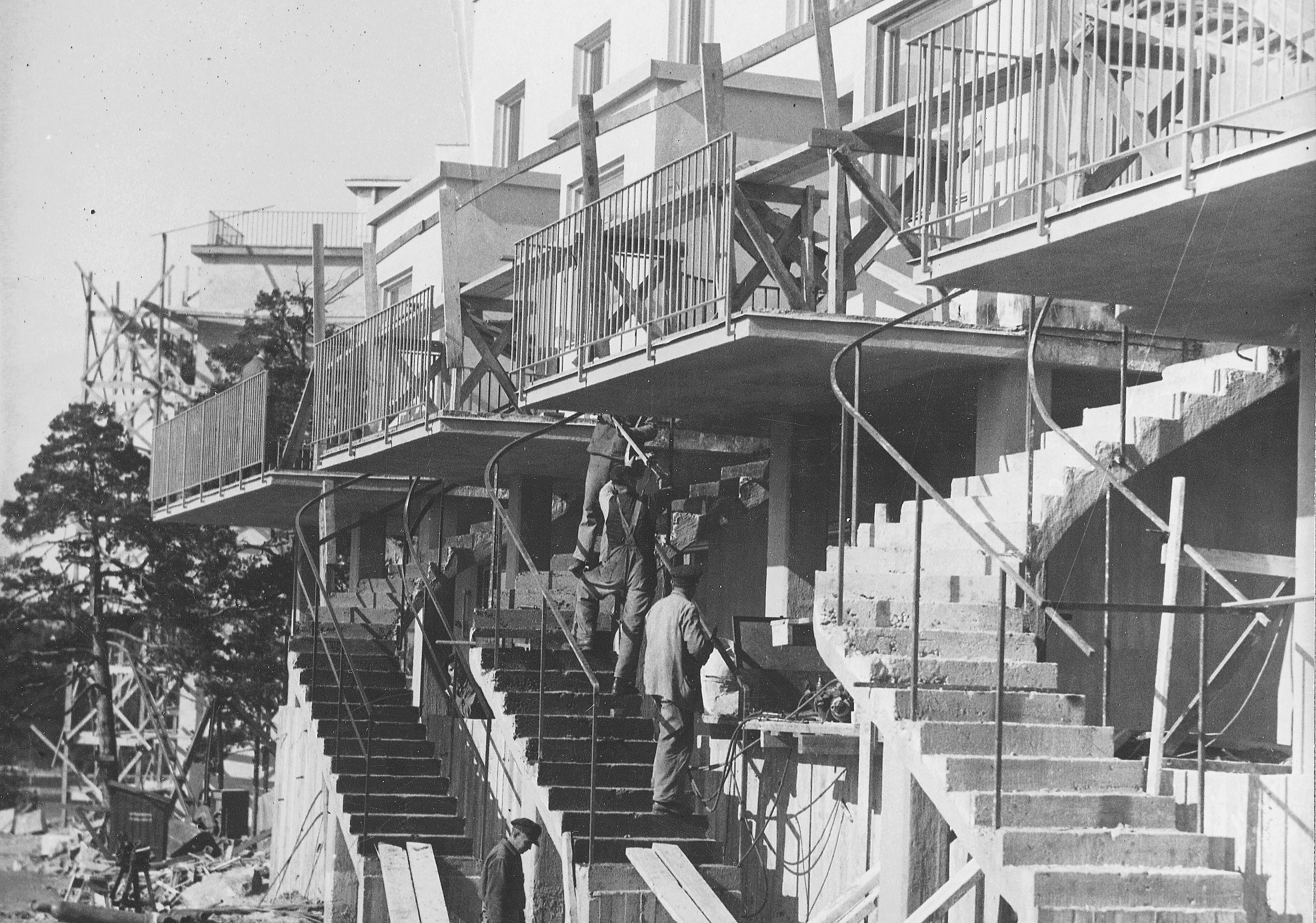 Byggarbeten för radhusen i kvarteret Tomten, Fredhäll